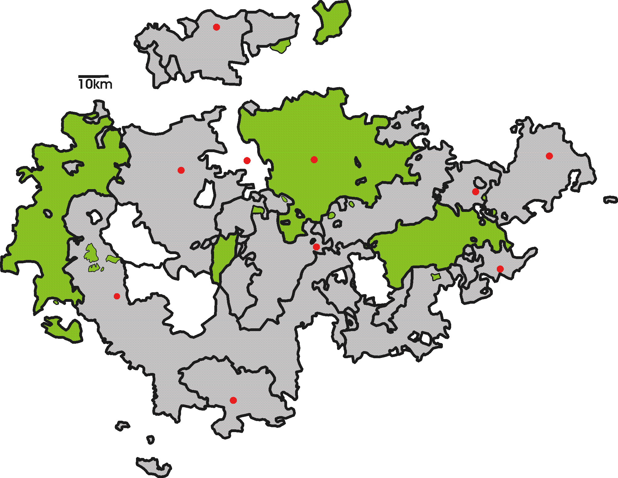 Karte Thüringen 1900 mit Herzogtum Sachsen-Weimar-Eisenach